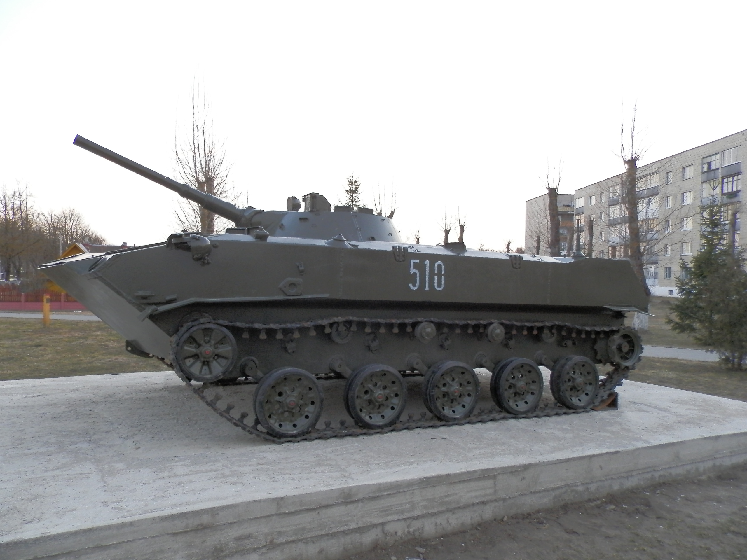 БМД-1 в Мяделе